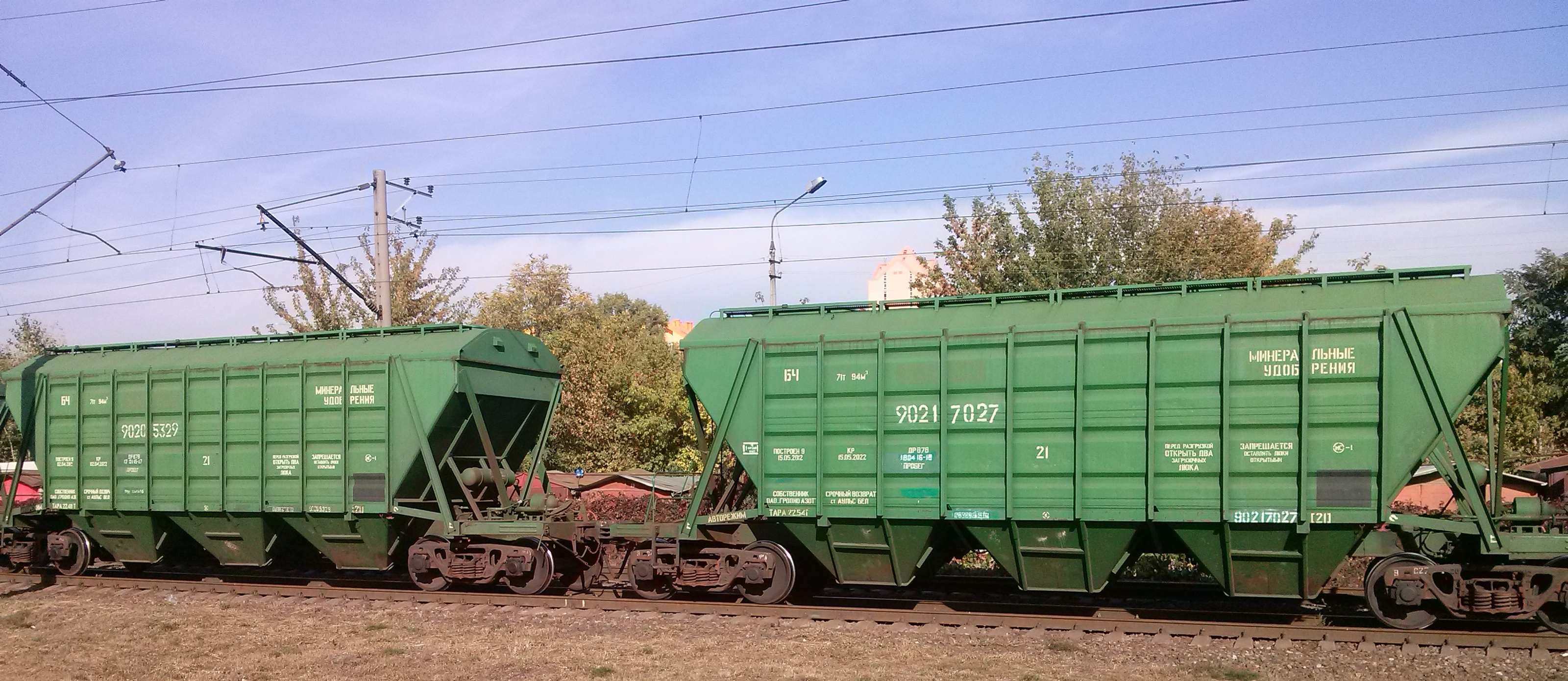 вагоны для перевозки минеральных удобрений